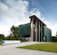 MPA Exterior